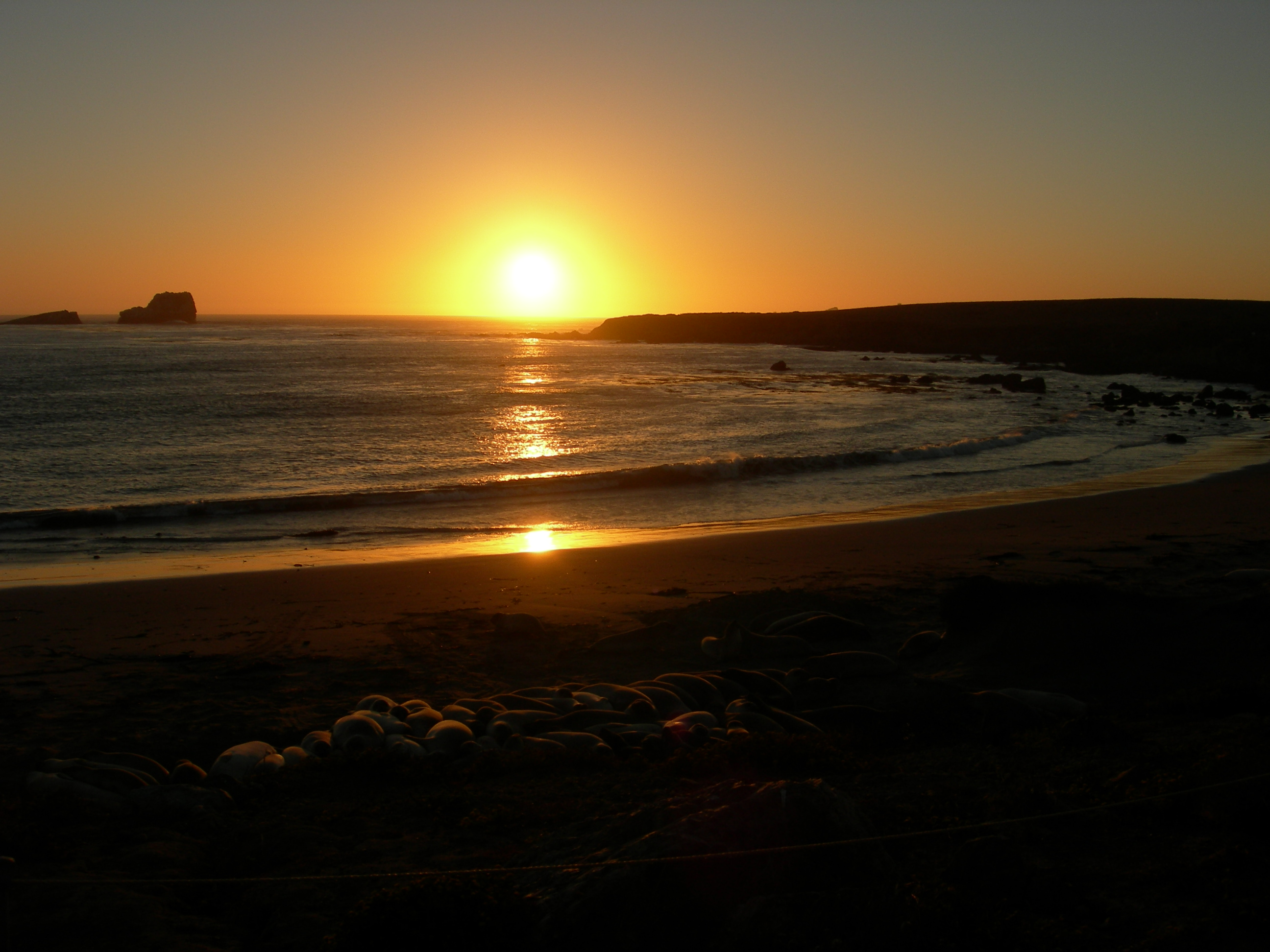 Strand an der Westküste der USA, ca. 250. Kilometer südlich von San Francisco.